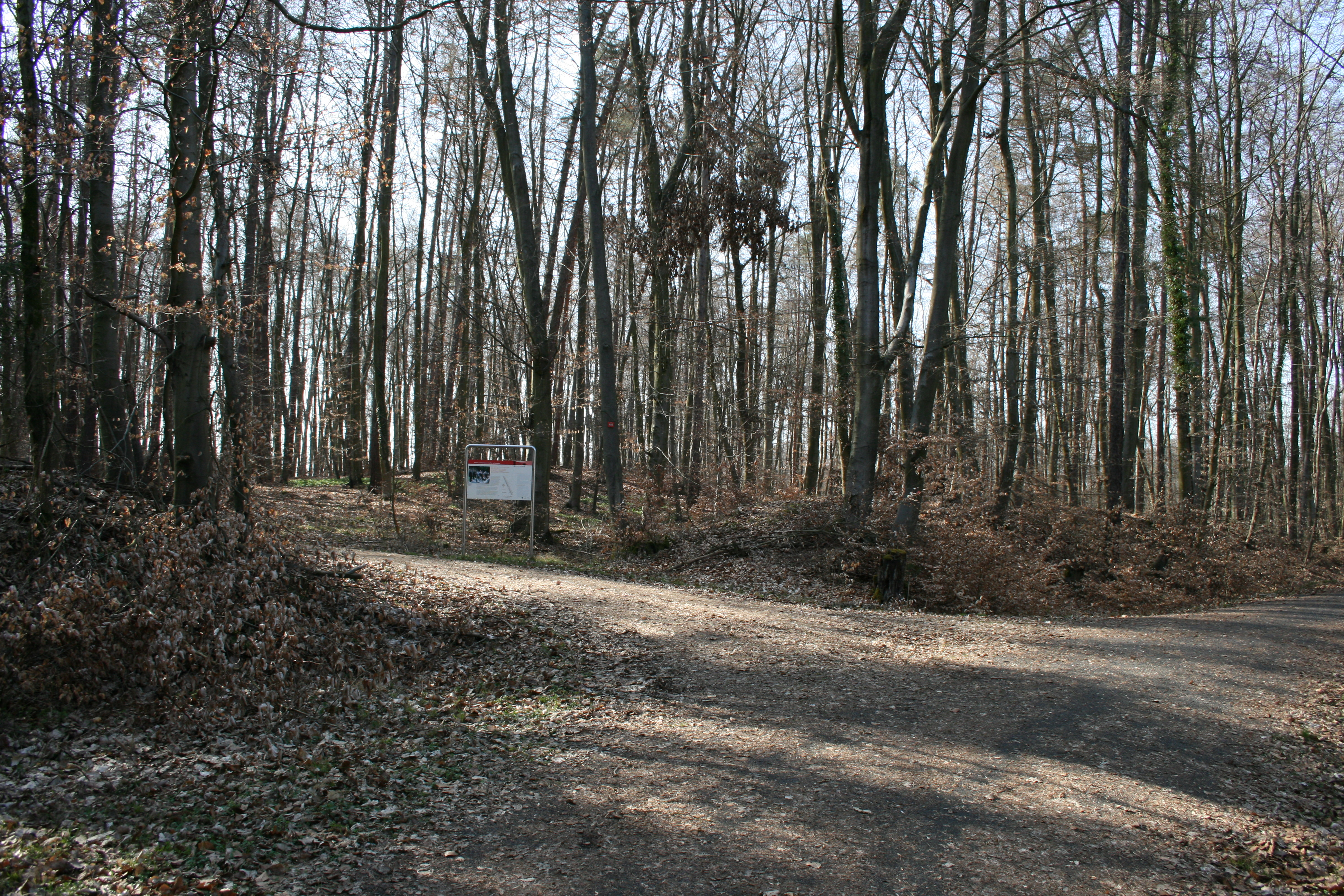 Kleinkastell Auf dem Buchkopf, Rechts und links im Vordergrund Waldweg, der Limeswall, Hinweisschild, dahinter links der 1,50m hoch erhaltene Hügel des Kleinkastells.